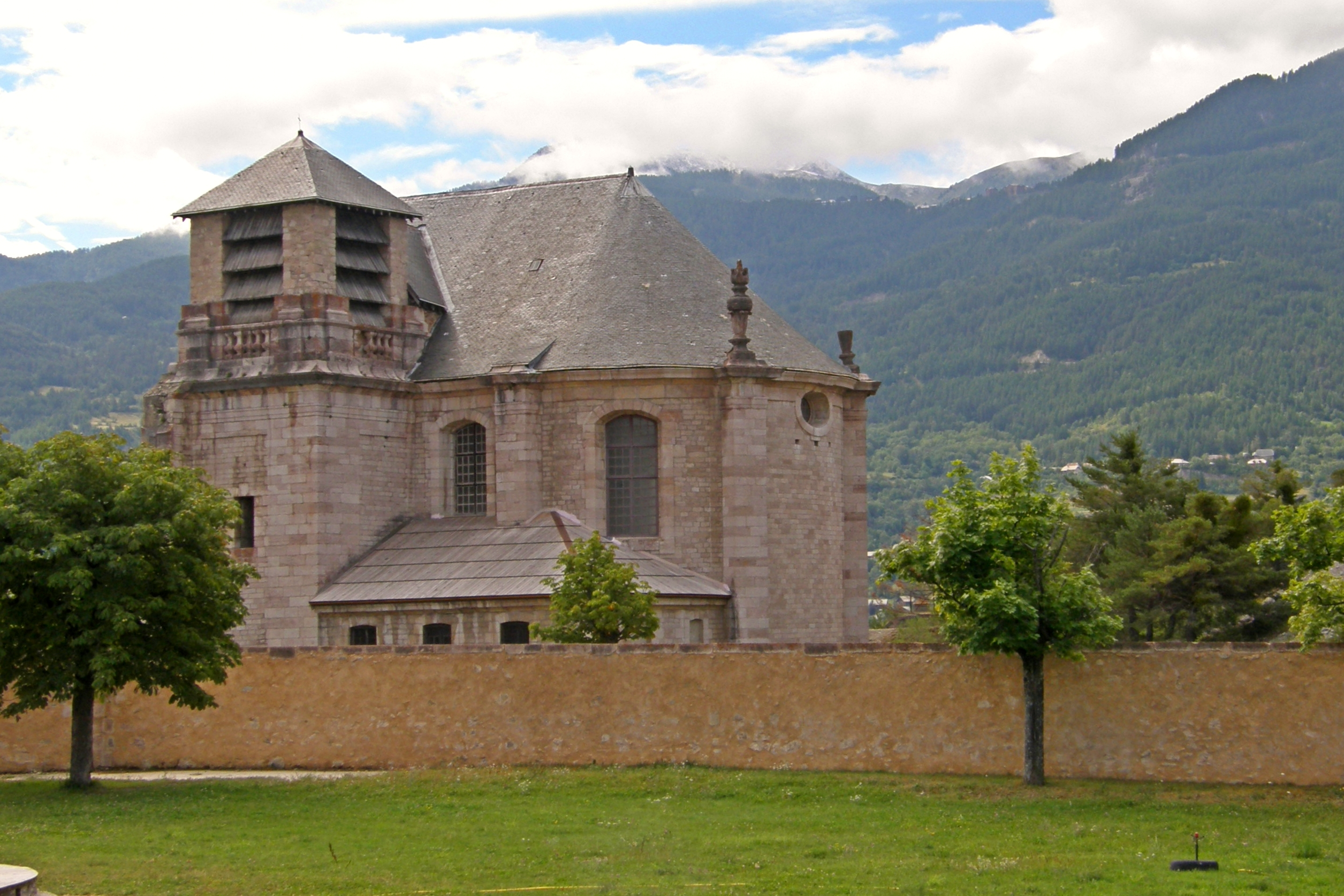 Église Saint Louis située dans l'enceinte du fort Mont-Dauphin, canton de Guillestre, département des Hautes-Alpes, France.